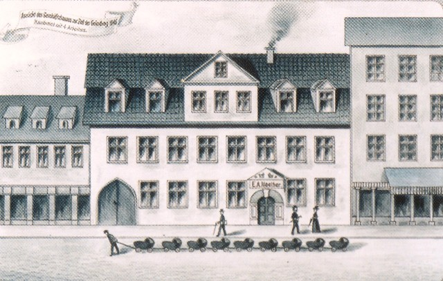 Judenstraße 2 in Zeitz 1850